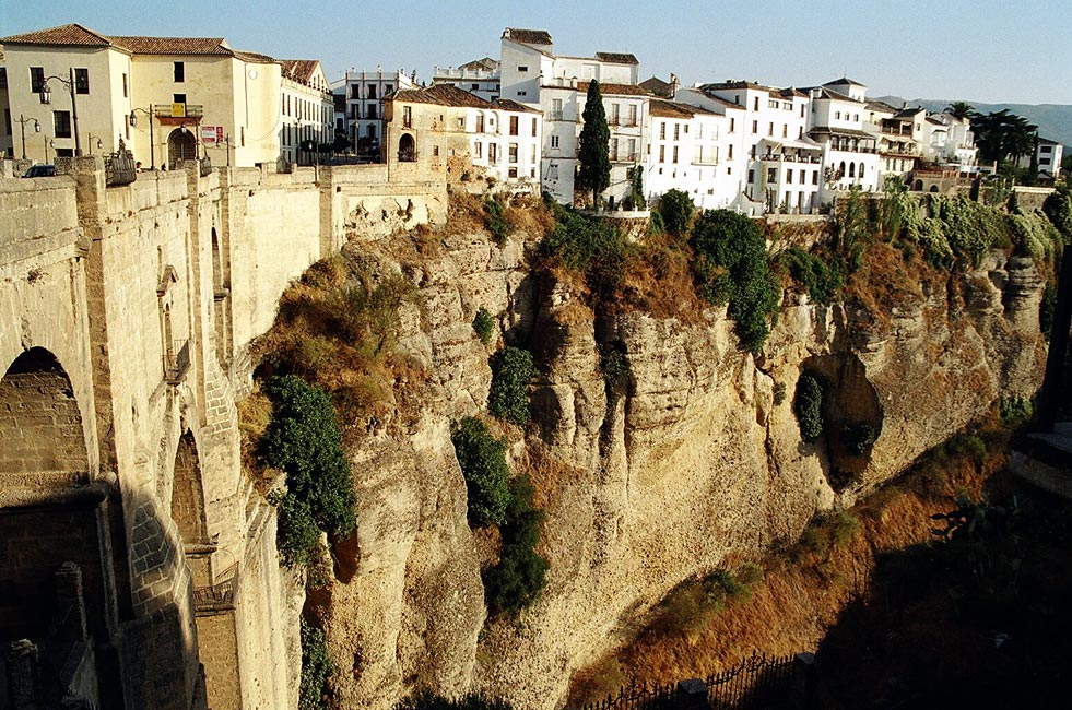 Ronda (Espana / Spanien / Spain) - El Puente Nuevo & La Ciudad